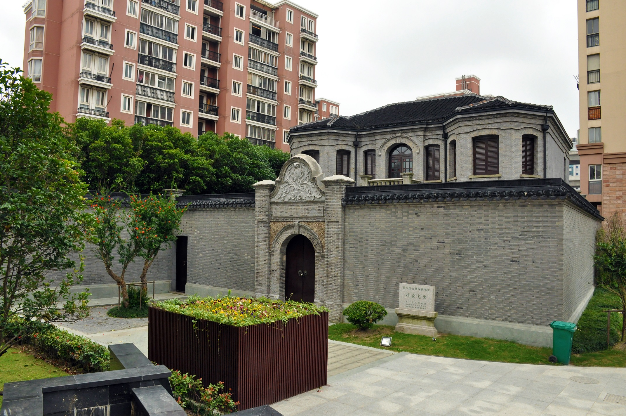 项家宅院 闵行老街南北大街94号内